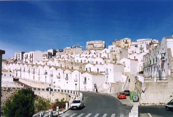 Monte Sant'Angelo, Puglia, ItaliaSan'Angelo Gargano